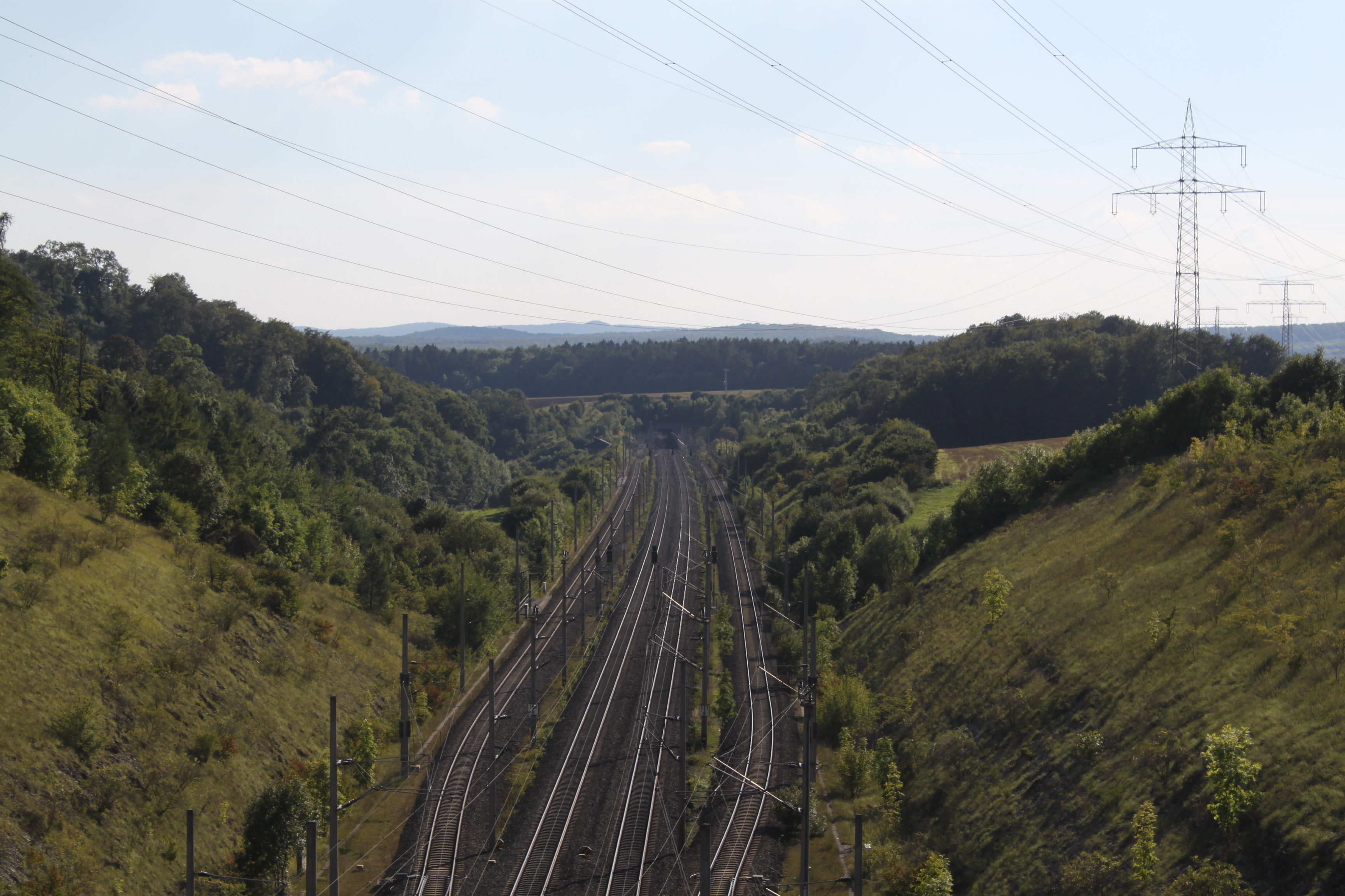 Überholbahnhof Jühnde